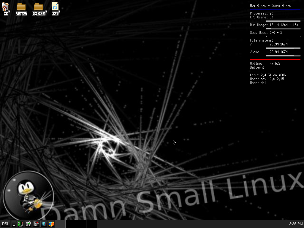 Premier écrans après installation